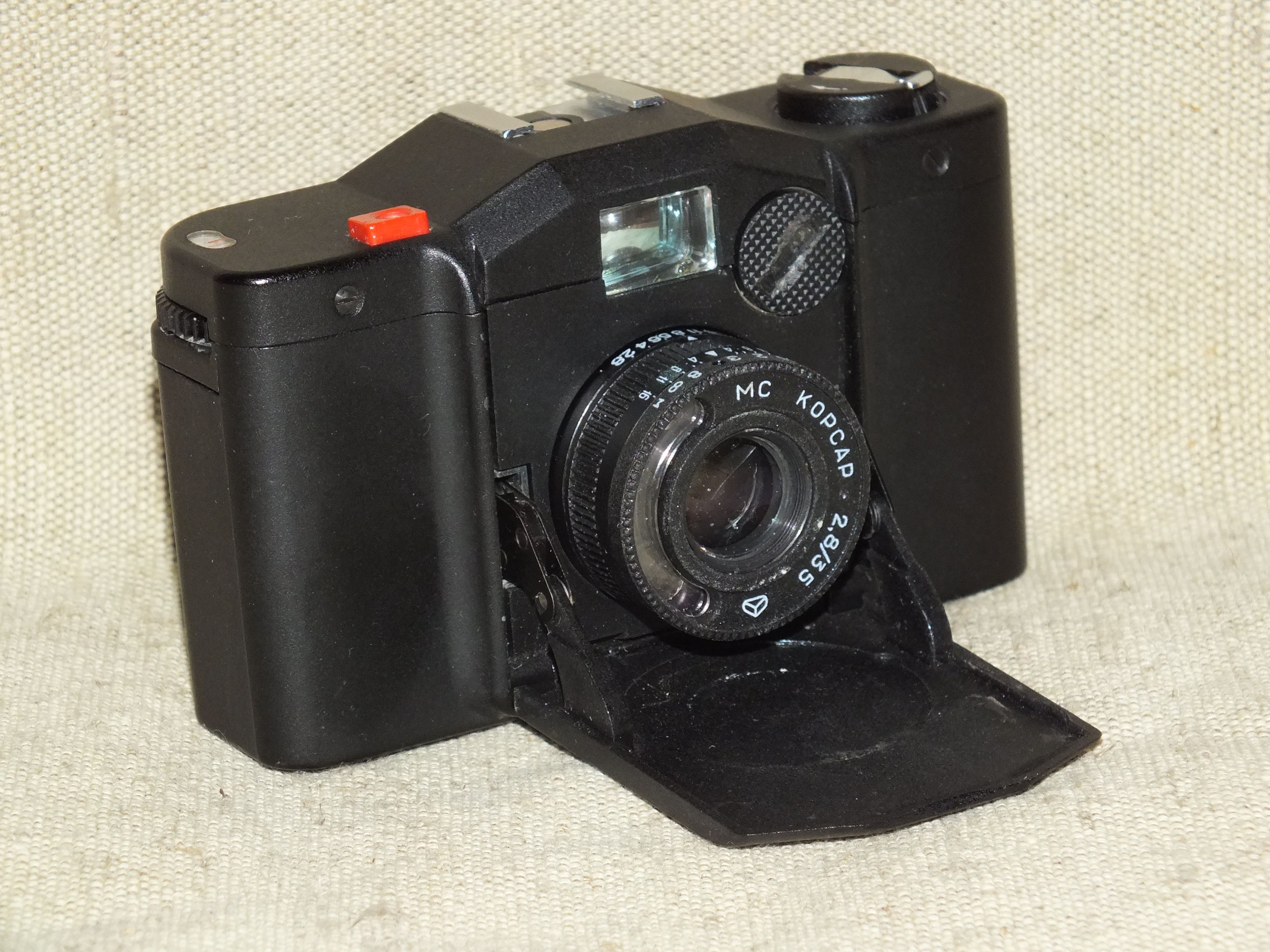 Kiev 35